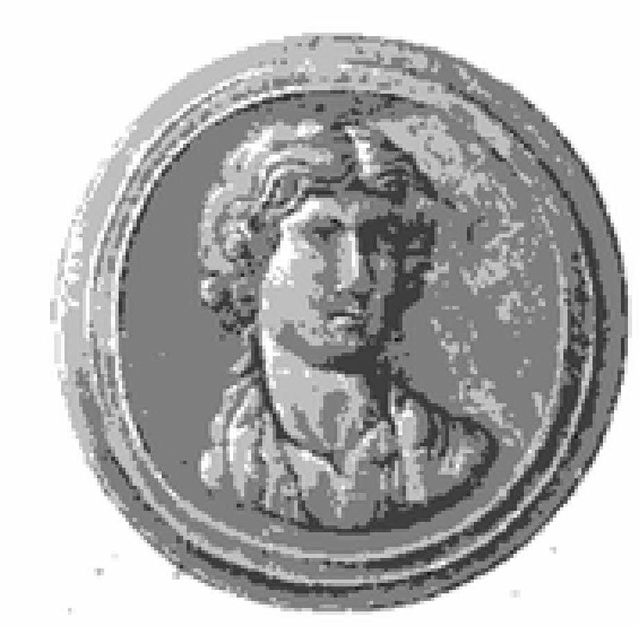 Römisches Antinousmedaillon, gefunden in Stanwix (Uxelodunum).